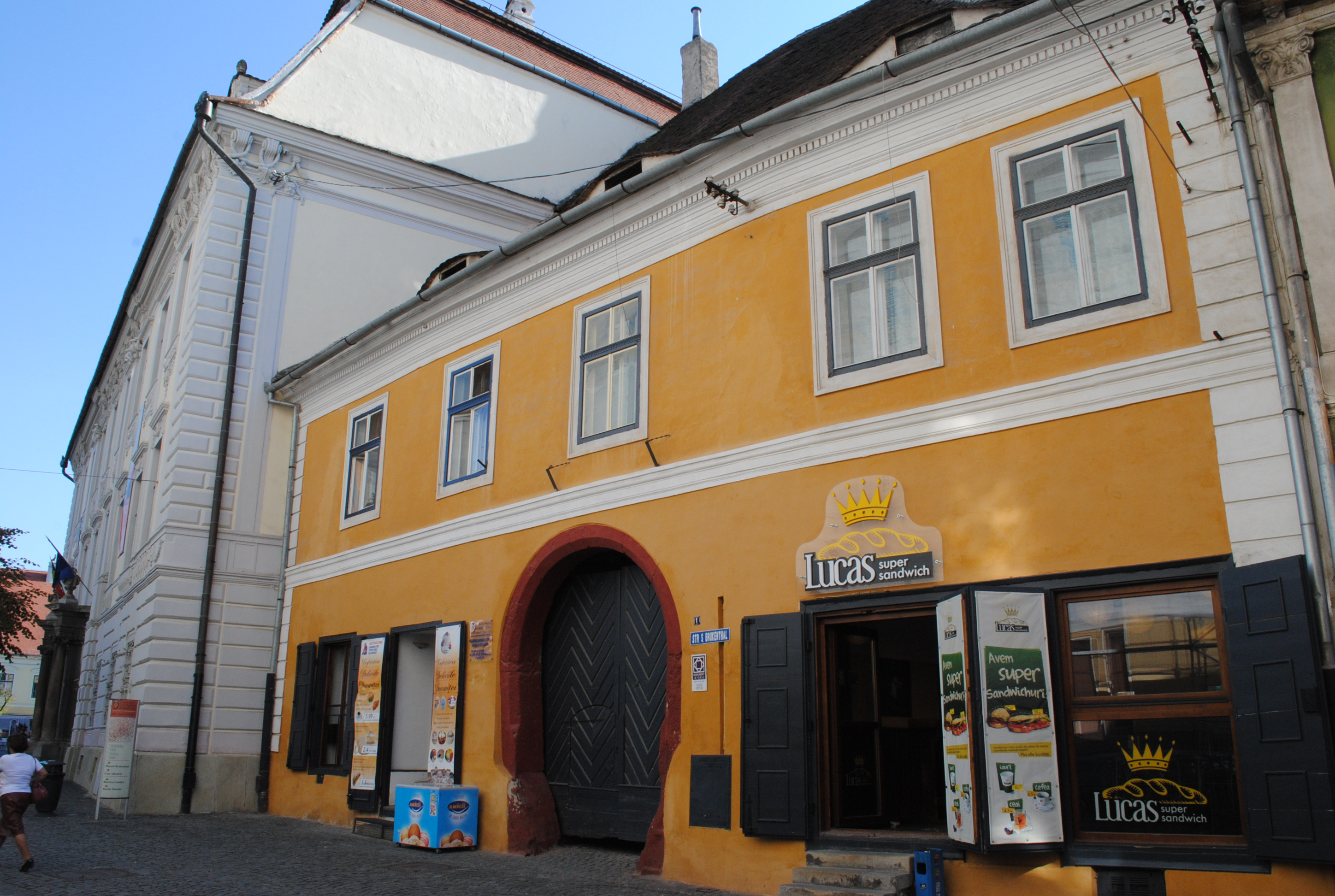 Casa Mövert, sec. XV, sec. XVI; sec. XVIII